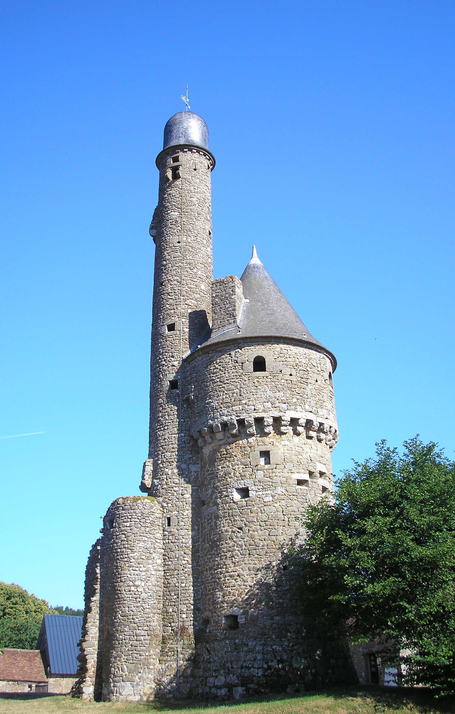 Juvigny-sous-Andaine (Normandie, France). La tour de Bonvouloir.